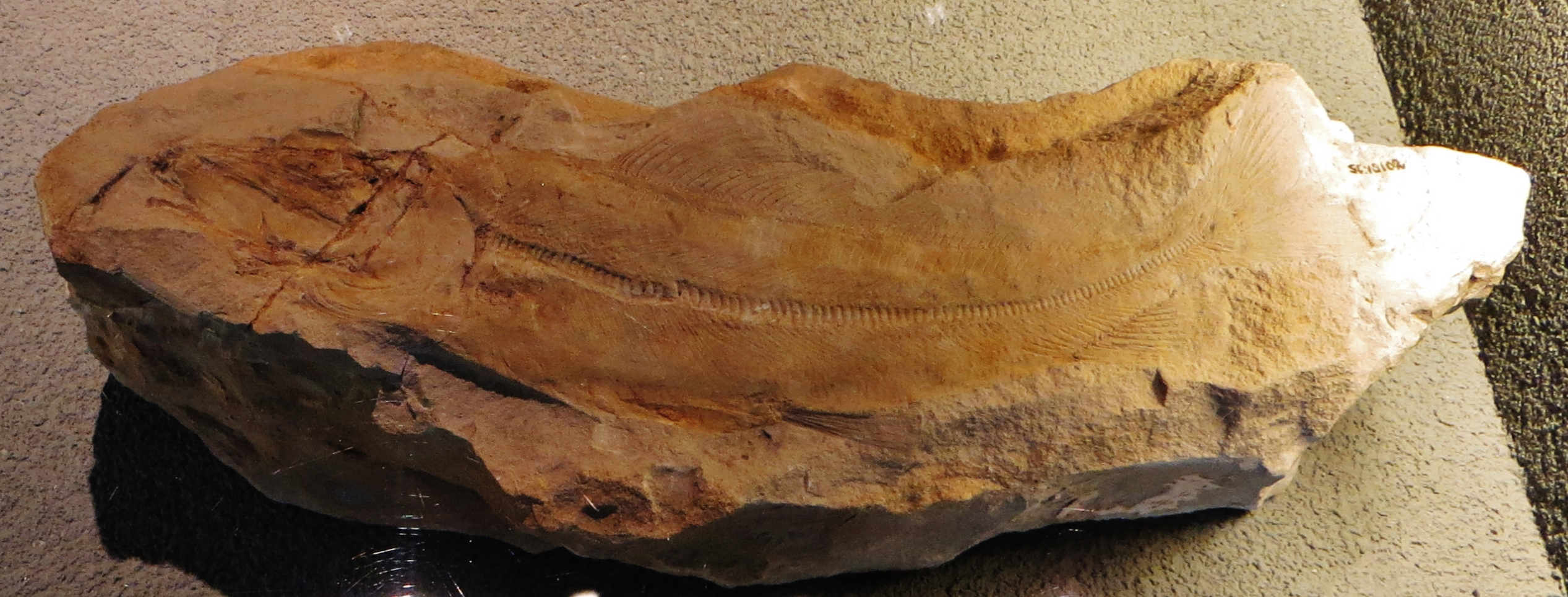 Fossil of Istieus - Took the picture at Naturalis, Leiden